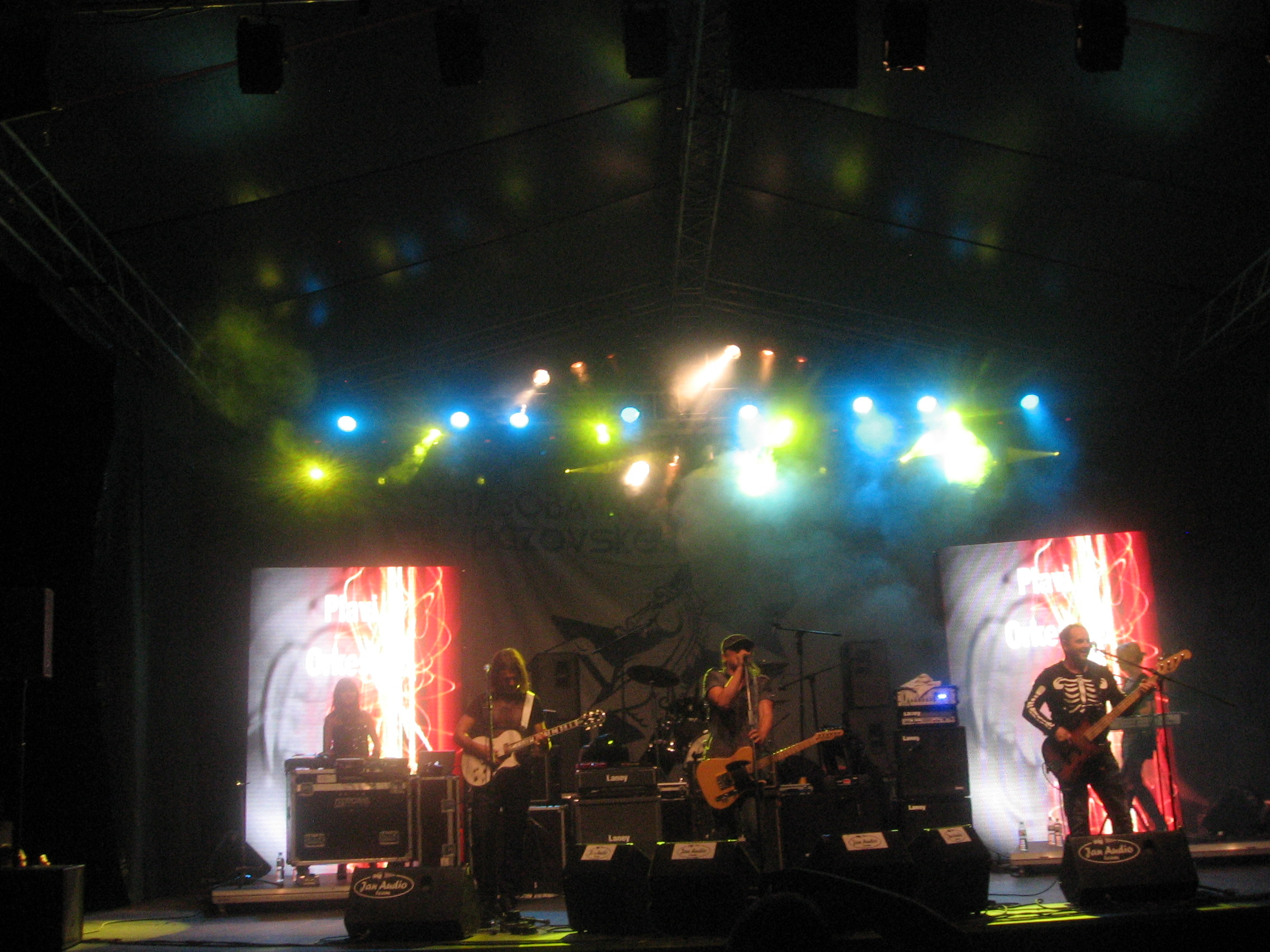 Концерт групе Плави оркестар.